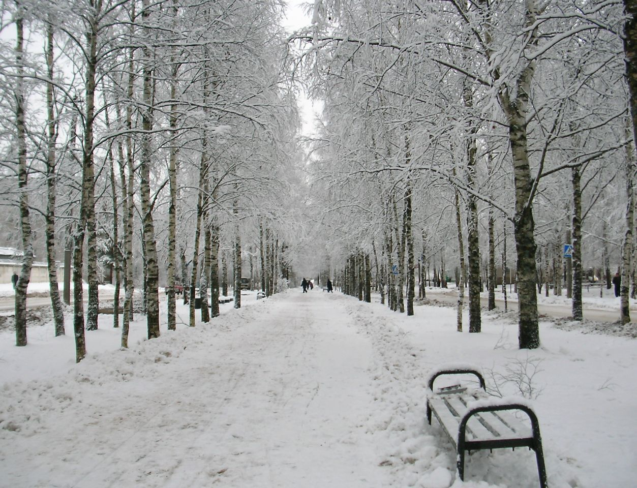 ул. Энтузиастов, пгт. Кадуй